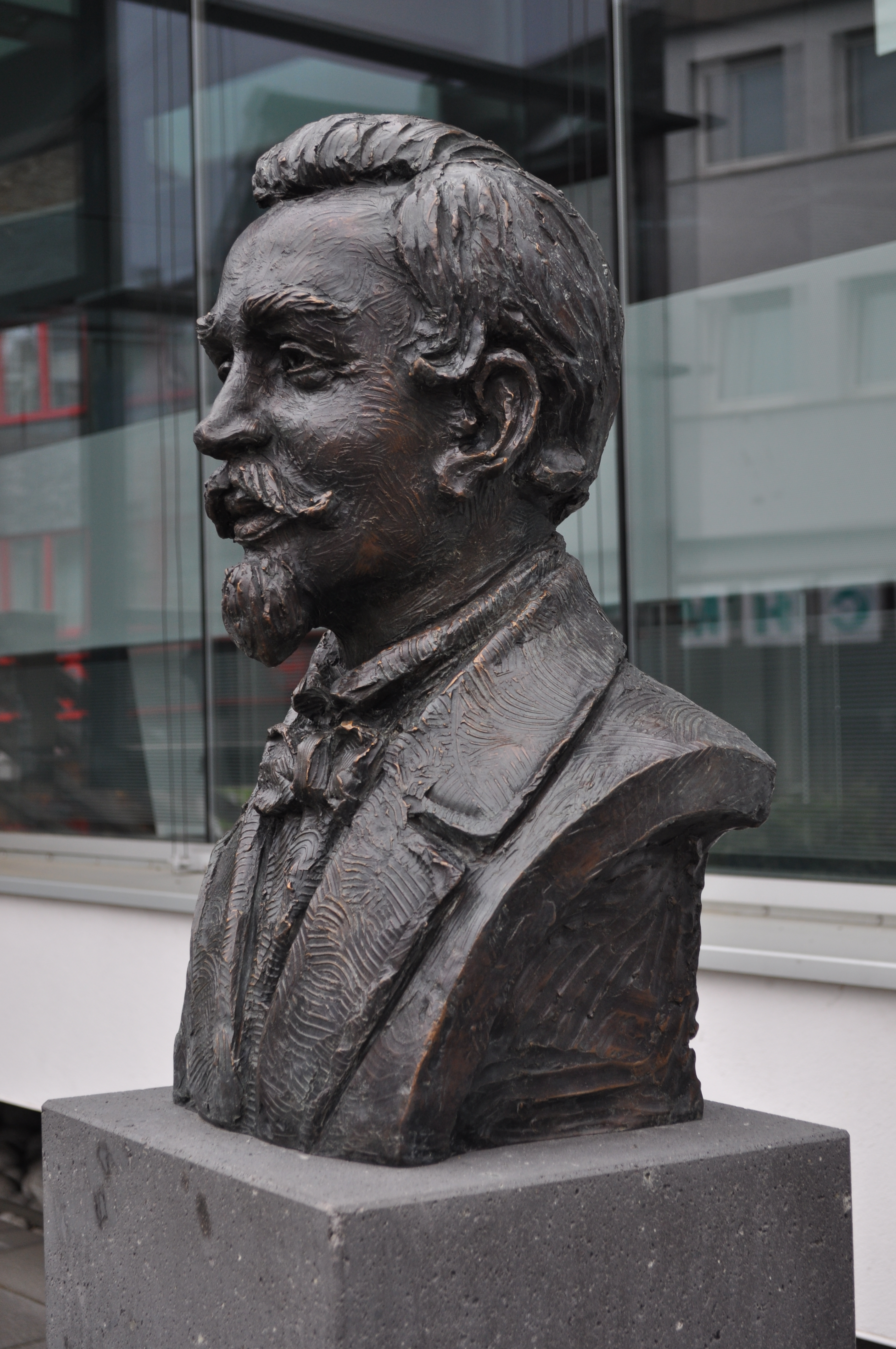 Büste von Gustav Justi vor der VR Bank in Idstein. Die Büste wurde 2011 von Waldemar Schröder geschaffen